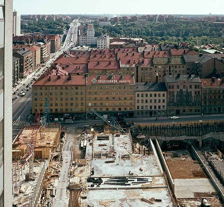 Vy från Skatteskrapan söderut över byggarbetsplatsen för Åsö gymnasium. Till höger syns en del av Söderledstunneln unde anläggande.